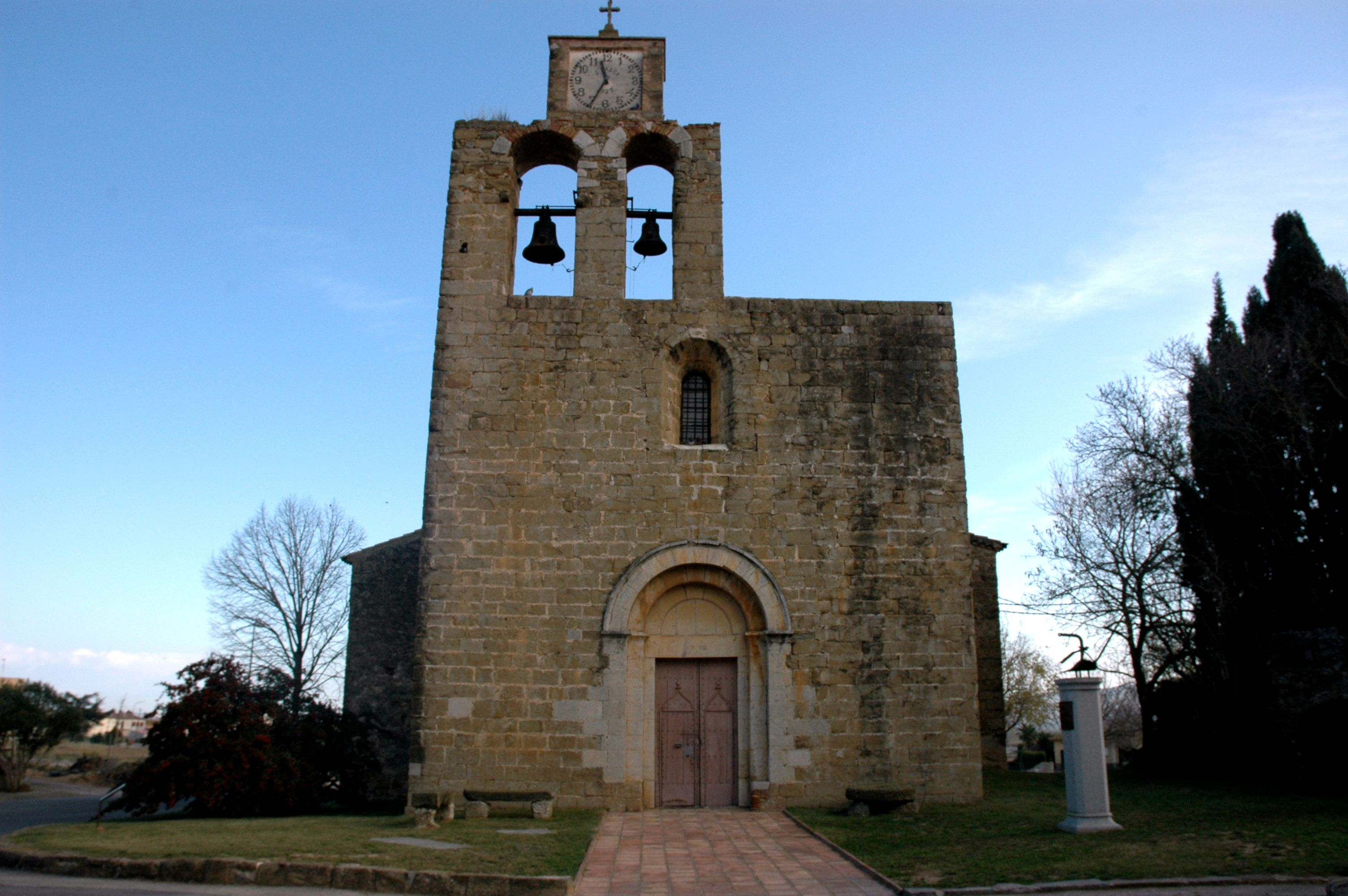 Santa Maria de la Tallada - Façana